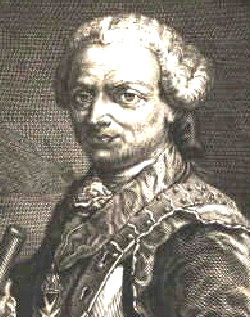 Antoniotto Botta Adorno (ca. 1680-1774), ufficiale e ministro plenipotenziario dell'impero asburgico